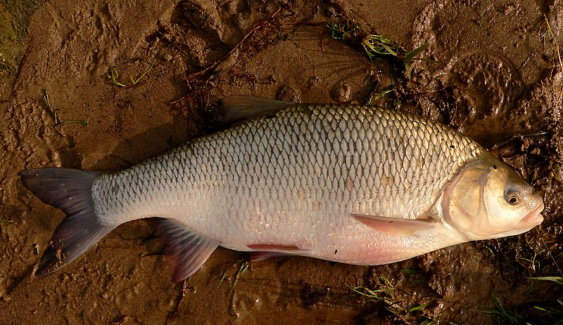 Leuciscus Idus'Nederrijn Gelderland 50 cm